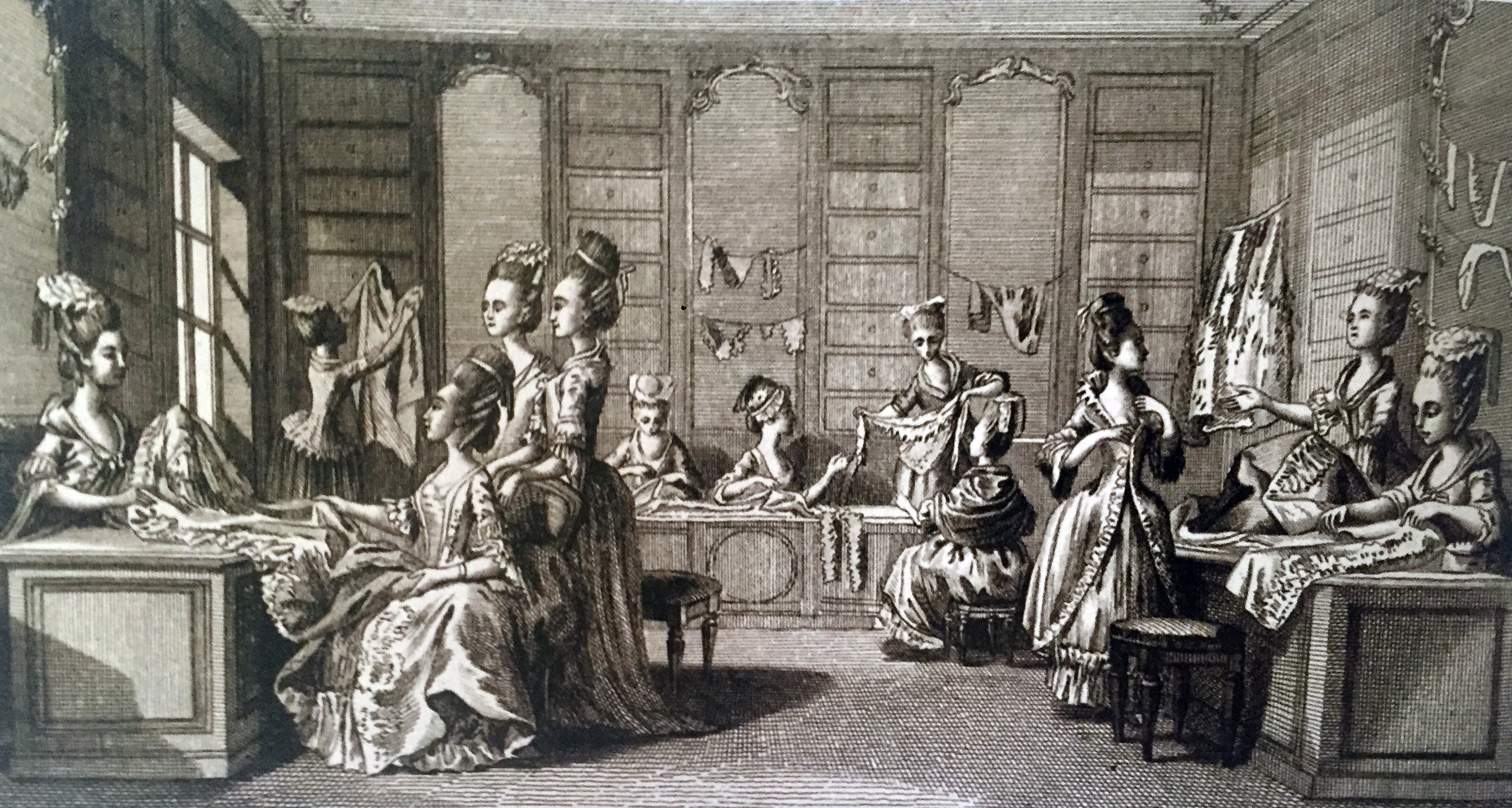 Gravure de l'Encyclopédie de Diderot et d'Alembert